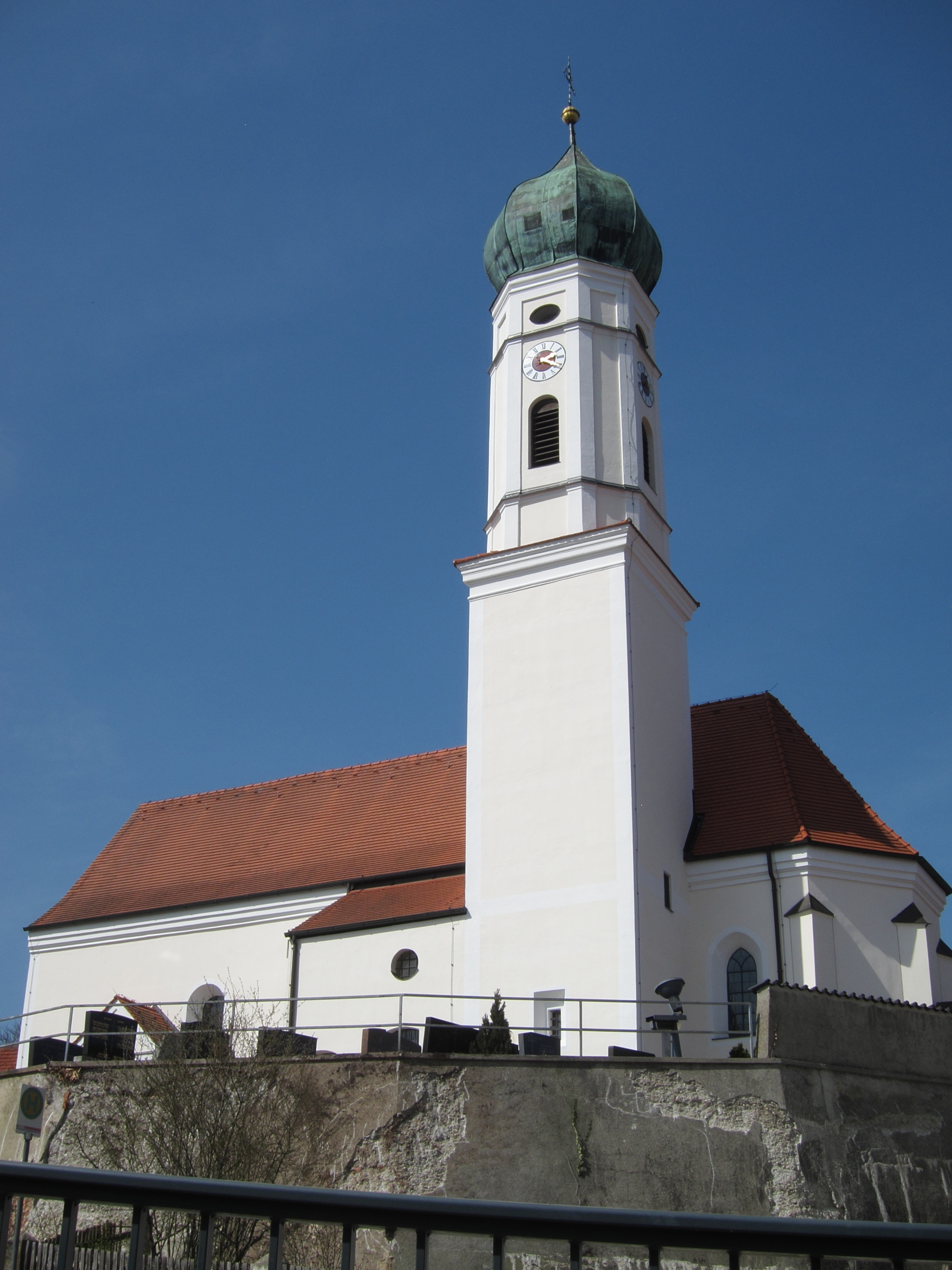 Pfarrkirche Sankt Emmeram in Geisenhausen, Gemeinde Schweitenkirchen